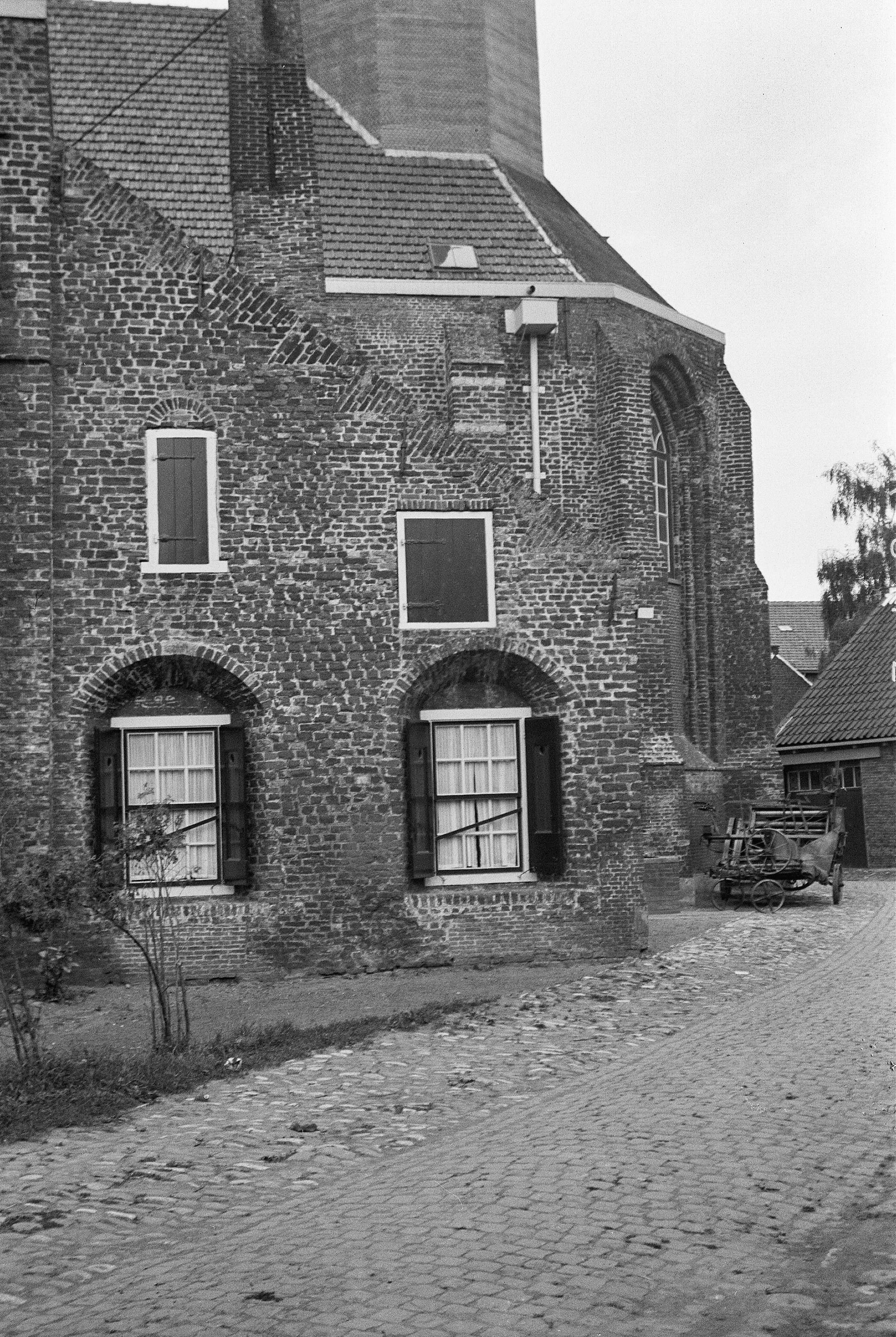 Nederlands Hervormde Kerk: koor